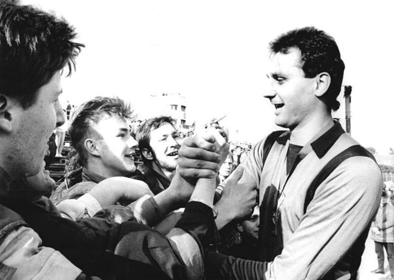 ADN-ZB-Settnik-1.4.89-fd-Berlin: BFC Dynamo gewann FDGB-Pokal- Nach dem 1:0-Sieg über den FC Karl-Marx-Stadt nimmt Bodo Rudwaleit, Torhüter des siegreichen BFC Dynamo, die Glückwünsche begeisterter Fans entgegen.